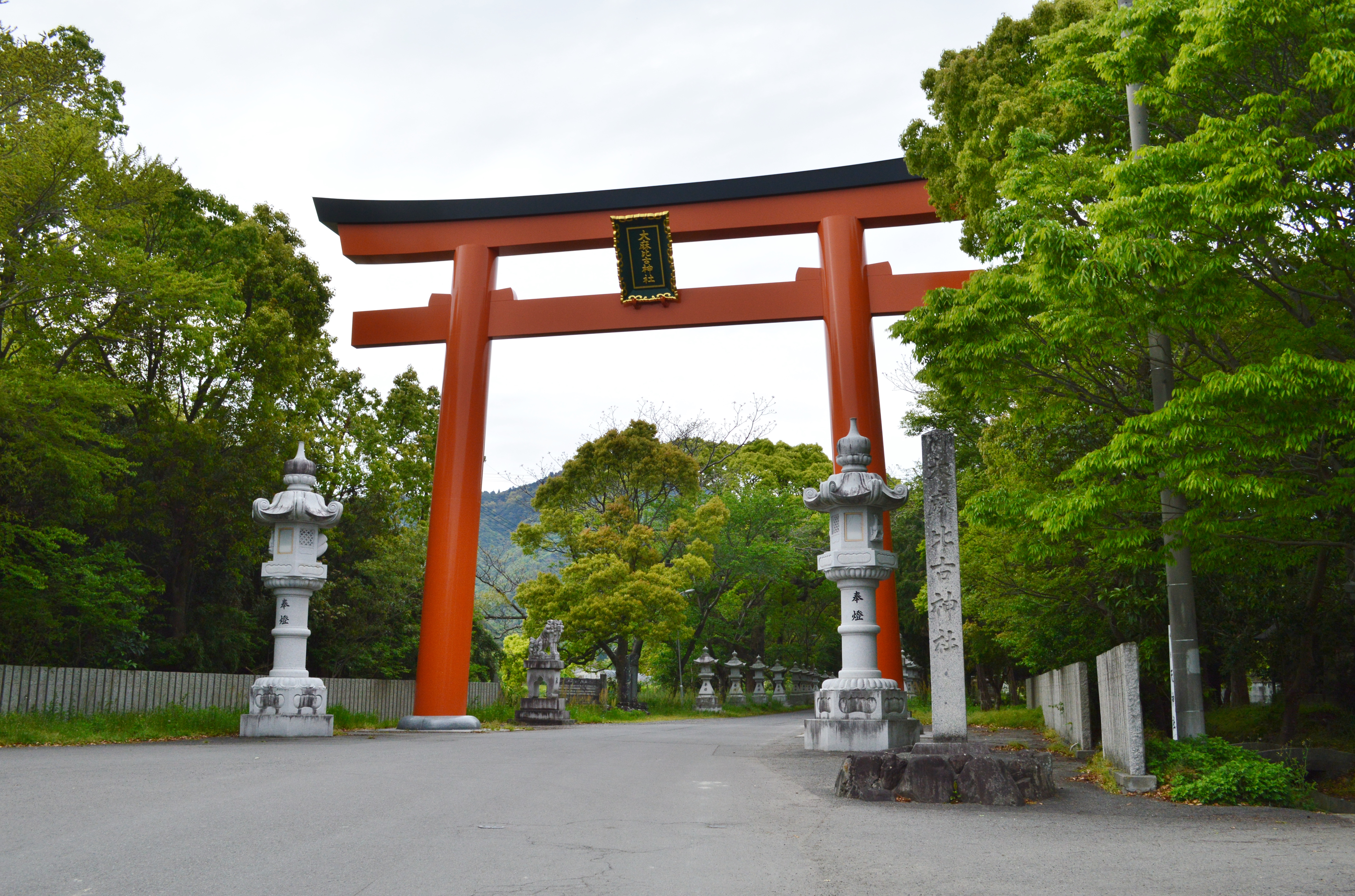 大麻比古神社 大鳥居 Nikon D3200